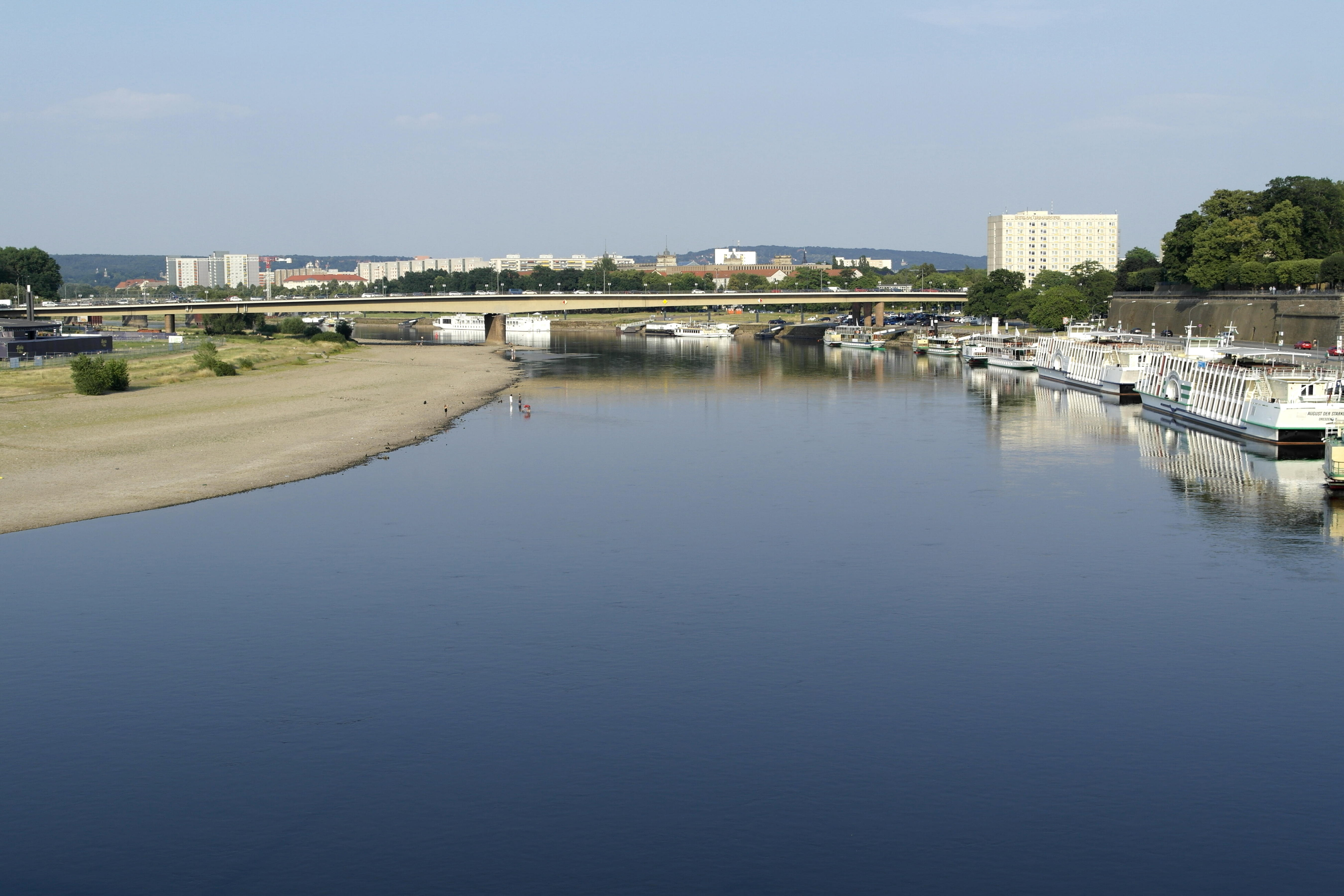 Elbe 2015 Wasserstand 65 cm, Blick zur Carolabrücke.